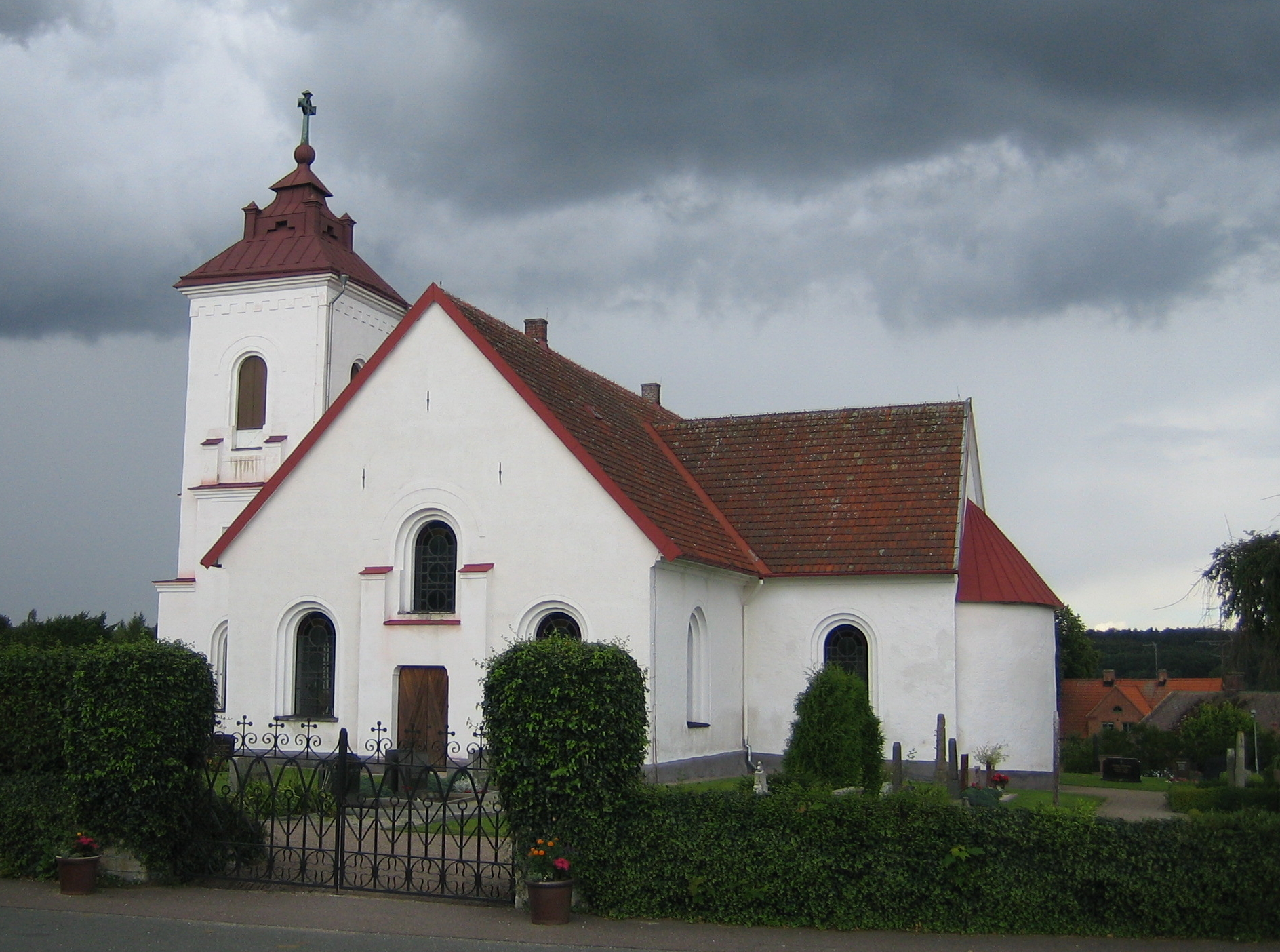 Brösarps kyrka.